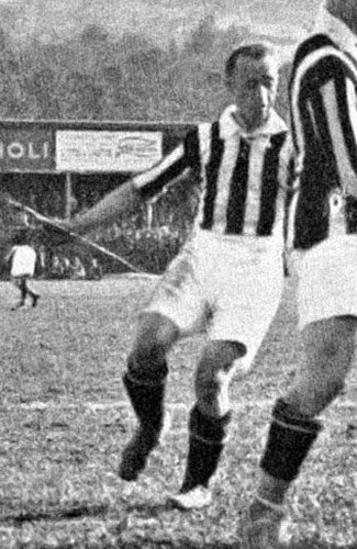 Bologna, stadio Sterlino, 11 luglio 1926. Il centrocampista juventino József Violain azione nel corso della sfida tra Bologna e Juventus (2-2) valevole per l'andata della finale di Lega Nord del campionato italiano di Prima Divisione 1925-26.